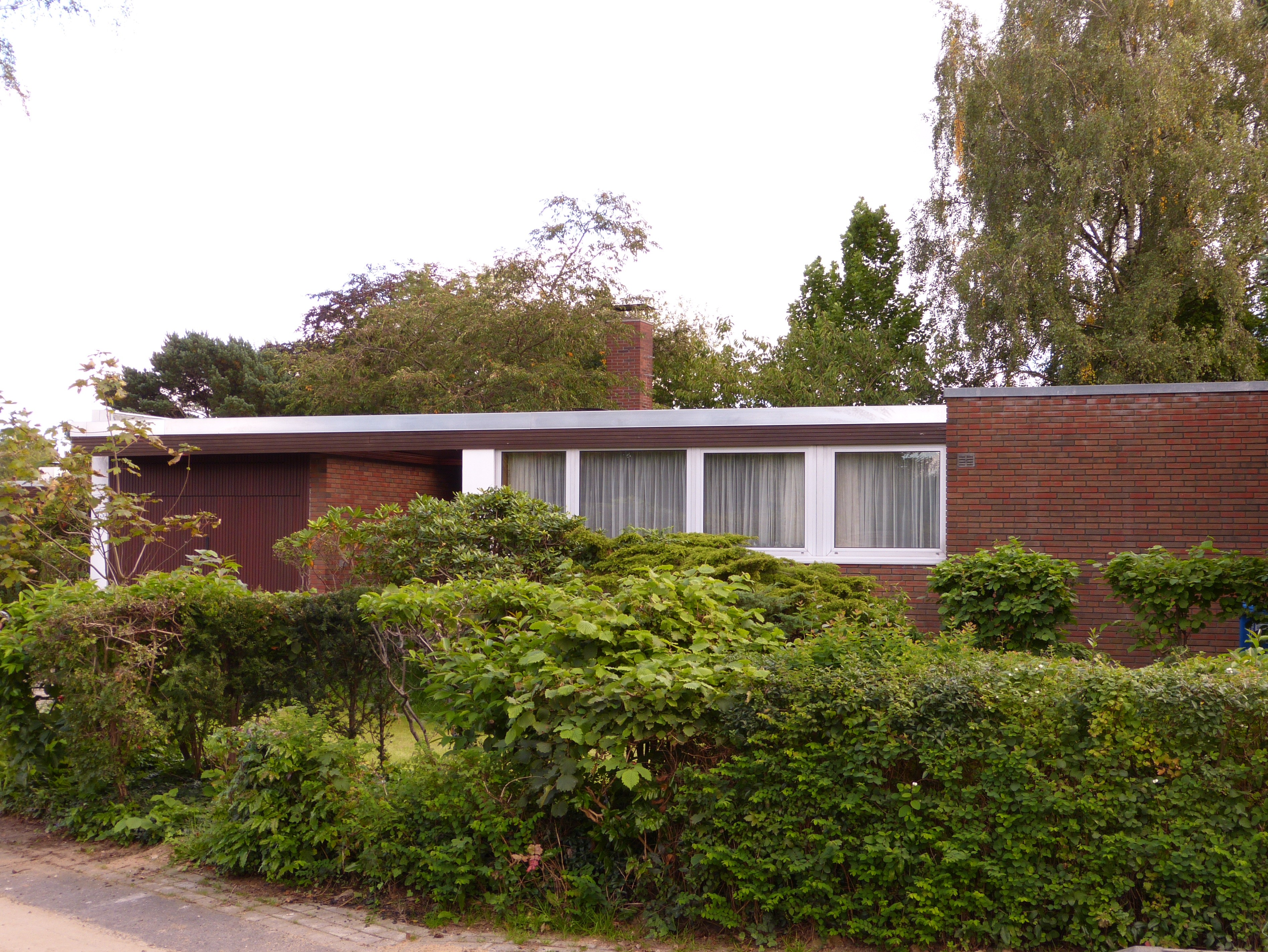 Das Bild zeigt ein Kulturdenkmal in Quickborn, Marienhöhe 83. Das Haus ist ein Teil der von dem Architekten Richard Neutra entworfenen Bewobau-Siedlung.